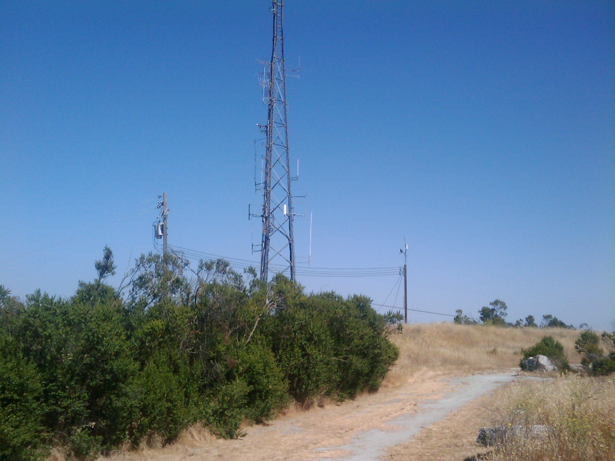 KSJO Radio Antenna